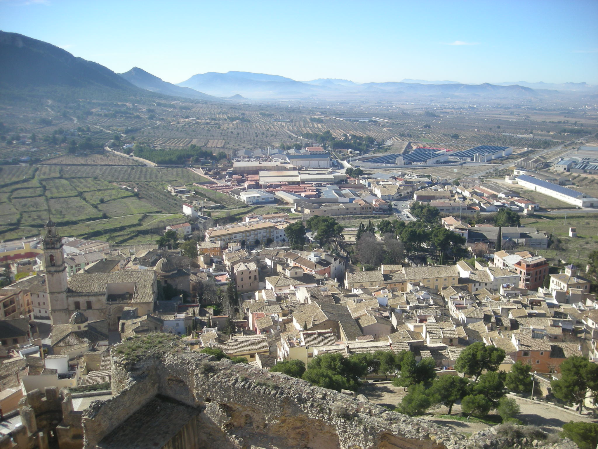 Biar i part del seu terme des del castell, cap al sud